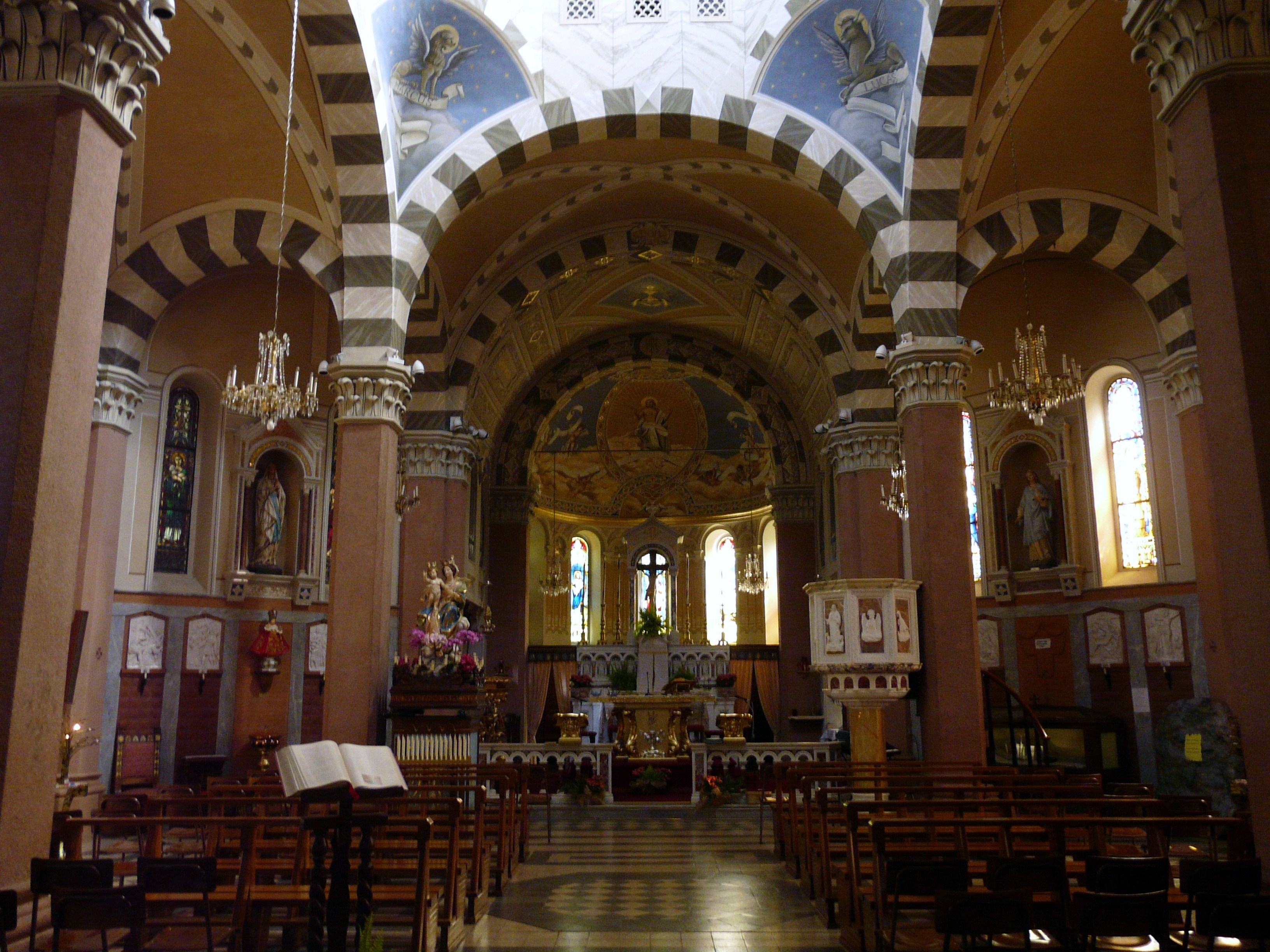 Serie di immagini della chiesa di San Bartolomeo, Magnasco, Rezzoaglio, Liguria, Italia